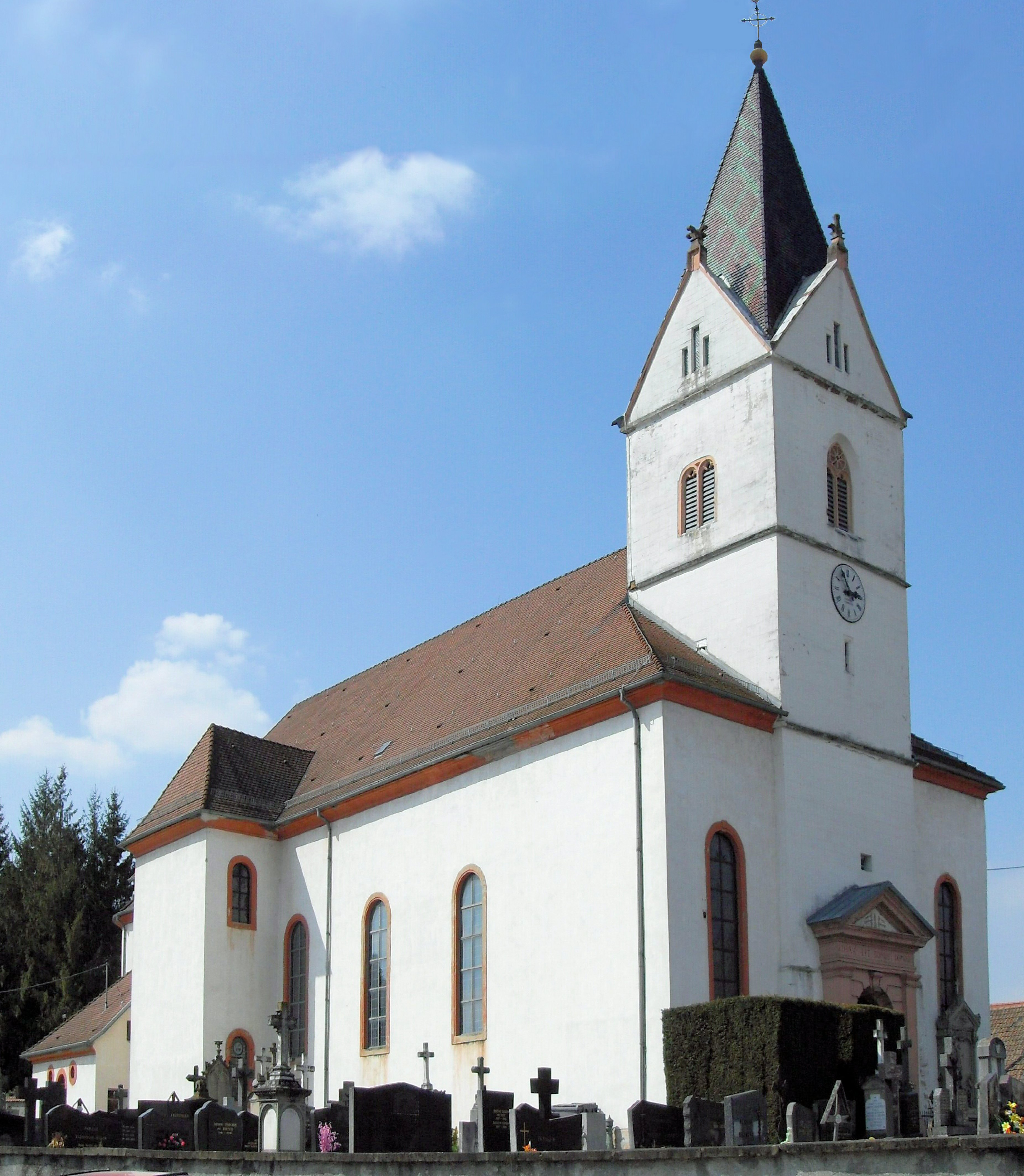 L'église de l'Assomption à Landser